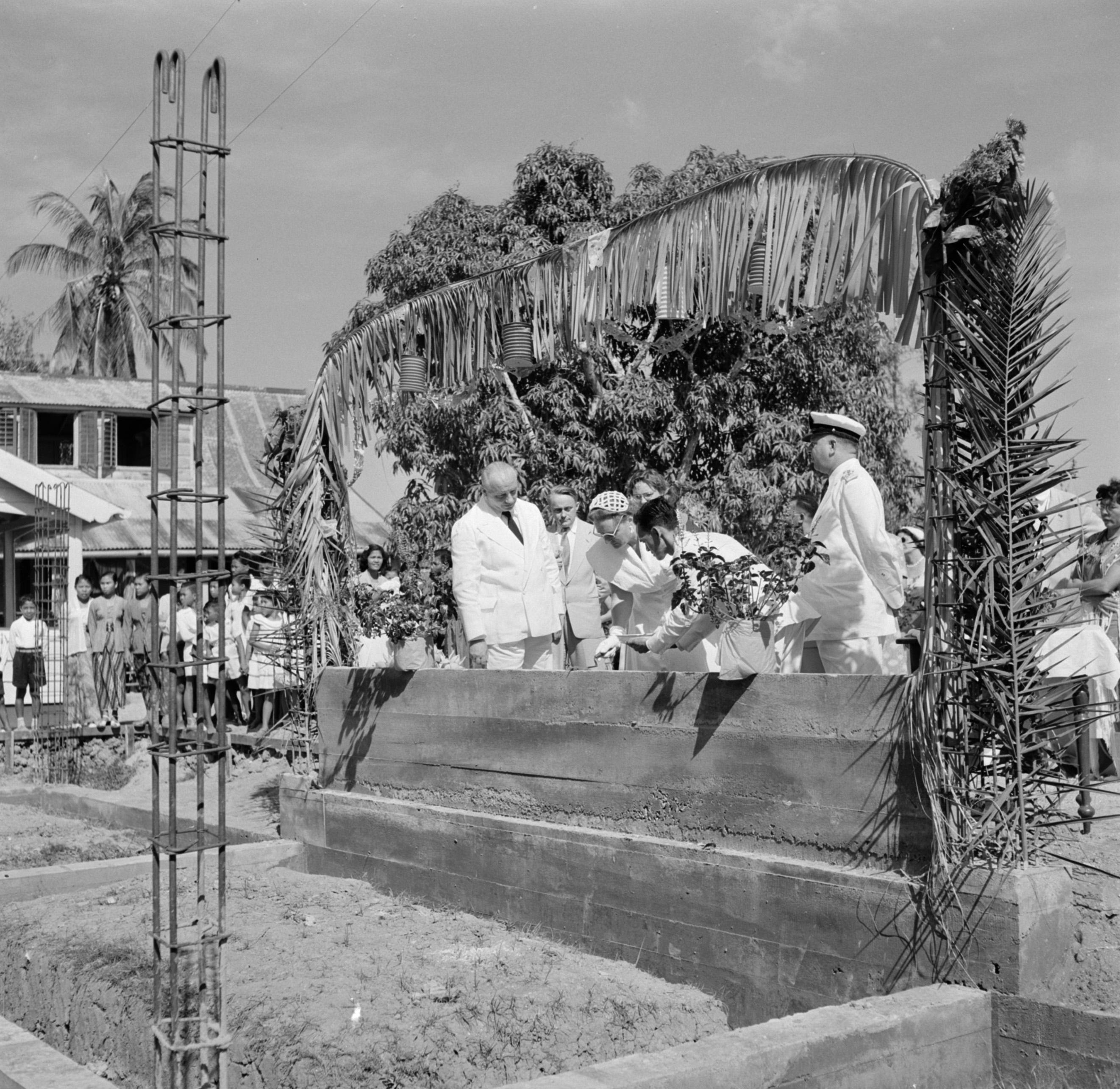 Collectie / Archief : Fotocollectie Van de Poll Reportage / Serie : Nederlandse Antillen en Suriname ten tijde van het koninklijk bezoek van koningin Juliana en prins Bernhard in 1955 Beschrijving : De koningin legt de eerste steen voor een tehuis voor Indonesische meisjes in Leliëndaal Datum : 1 november 1955 Locatie : Leliëndaal, Suriname Trefwoorden : bezoeken, inheemsen, kindertehuizen , koninginnen Persoonsnaam : Juliana, koningin Fotograaf : Poll, Willem van de Auteursrechthebbende : Nationaal Archief Materiaalsoort : Negatief (zwart/wit) Nummer archiefinventaris : bekijk toegang 2.24.14.02 Bestanddeelnummer : 252-4510